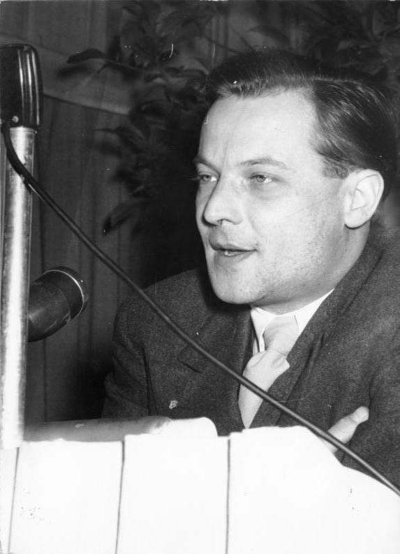 Zentralbild/Erfurt-Wittig 10.10.1956 Heinrich-Heine-Tagung in Weimar Am 8.10.1956 begann in Weimar die wissenschaftliche Heinrich-Heine-Tagung. Die Tagung, die vom Heine-Komitee Berlin durchgeführt wird, dauert bis zum 13.10.1956. Anwesend sind Gäste aus der Deutschen Demokratischen Republik, der Bundesrepublik, Polen, Jugoslawien, Island, Frankreich, CSR, Dänemark, England, China. Namhafte Wissenschaftler werden auf den einzelnen Tagungen sprechen. UBz.: Dr. Wolfgang Harich, Berlin, bei seinem Referat über das Thema: "Heine philosophische Anschauungen."